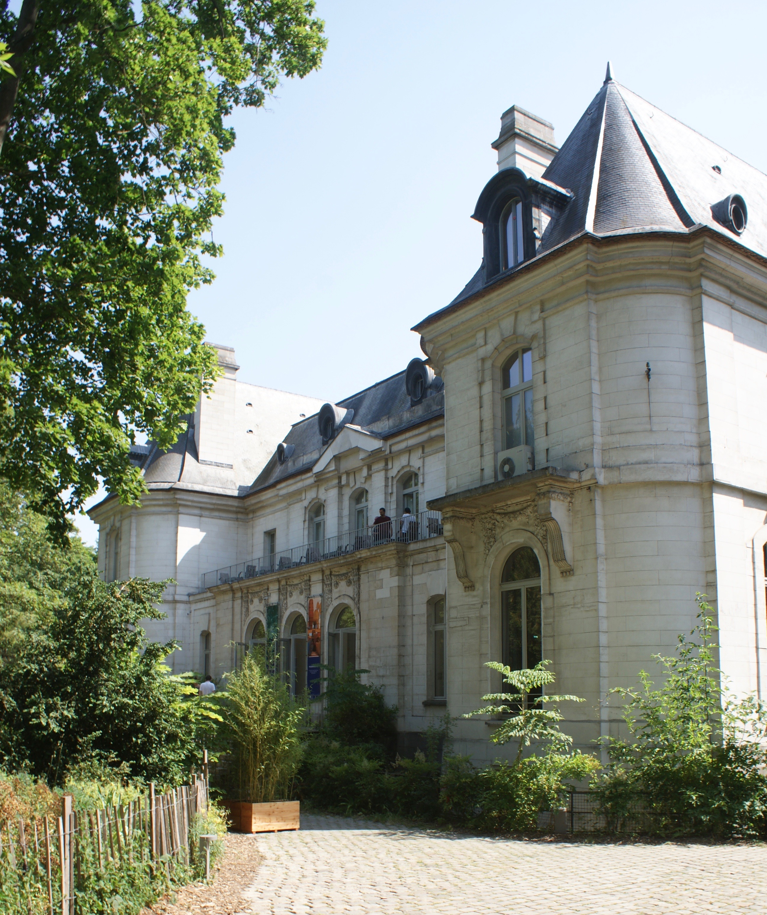 Le Château de Longchamp en 2019.